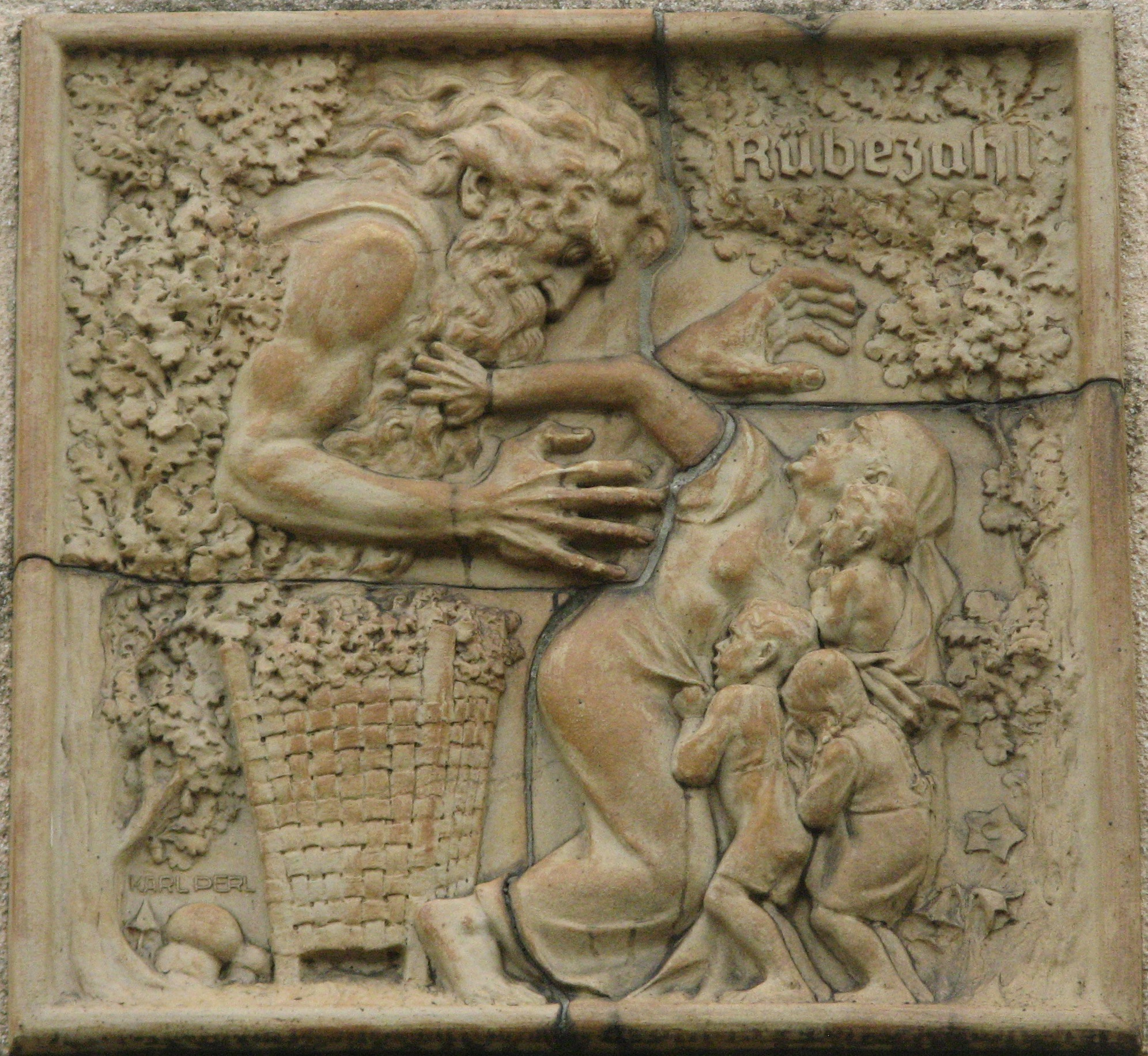 Rübezahl (um 1939) von Karl Perl, Johann-Mithlinger-Siedlung, Raxstraße 7-27, Wien-Favoriten